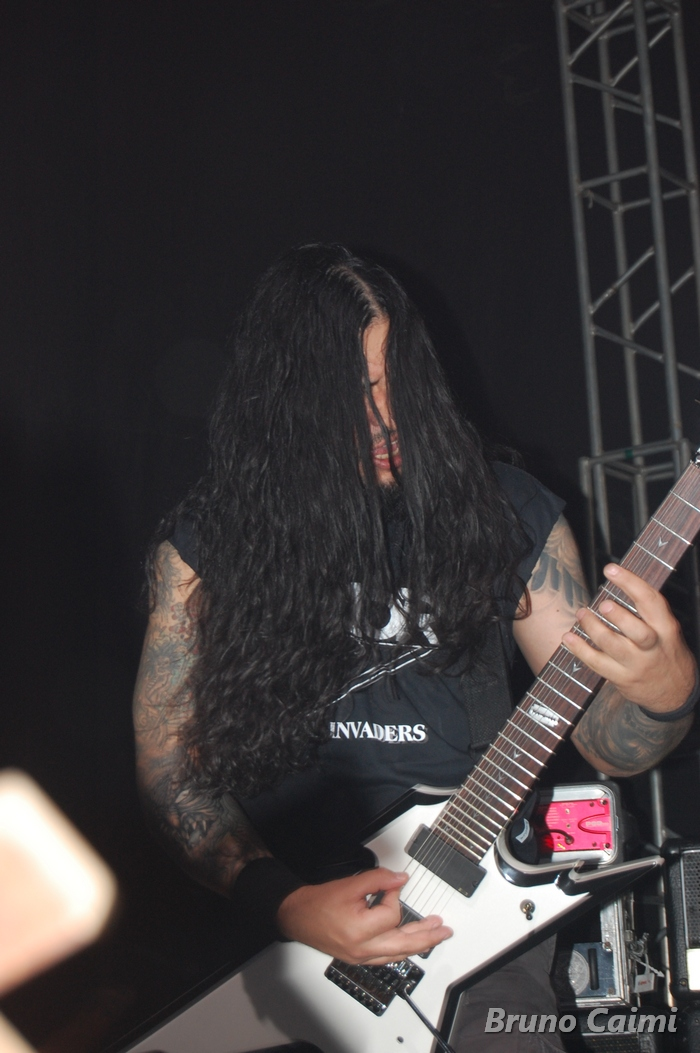 death metal band Krisiun